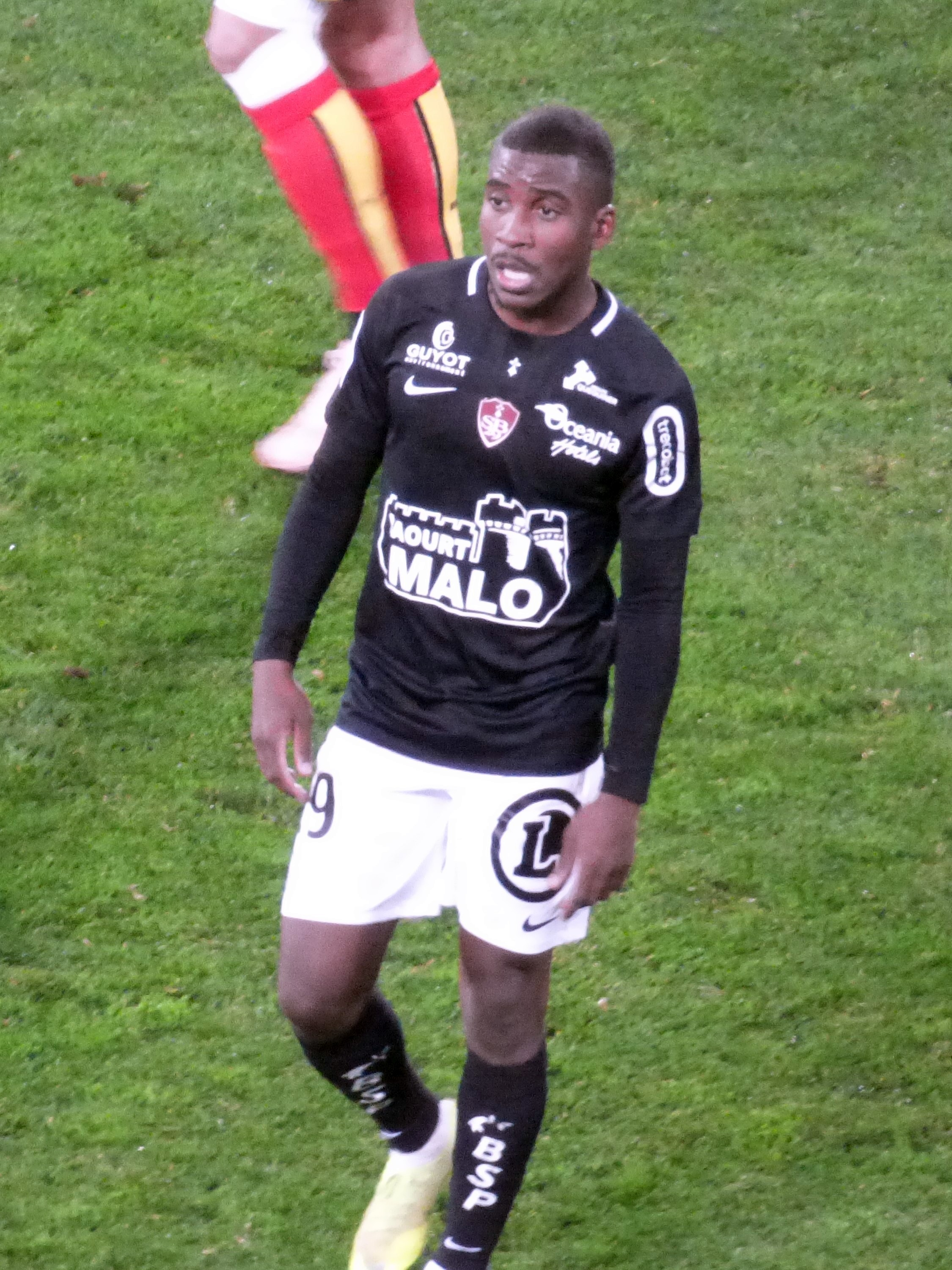 Ferris N'Goma lors du match RC Lens / Stade brestois, le 4 décembre 2018, comptant pour la dix-septième journée du championnat de France de football de Ligue 2 2018-2019, au Stade Bollaert-Delelis.